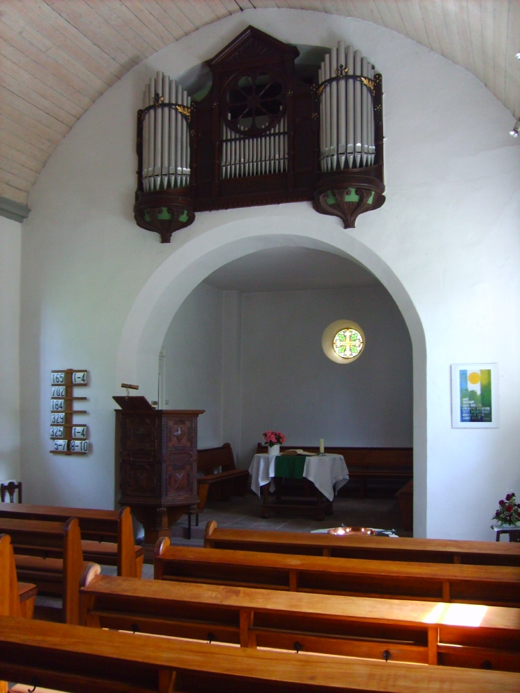 Pfarrkirche Schöller, Wuppertal, Germany; Blick auf Chor und Altar